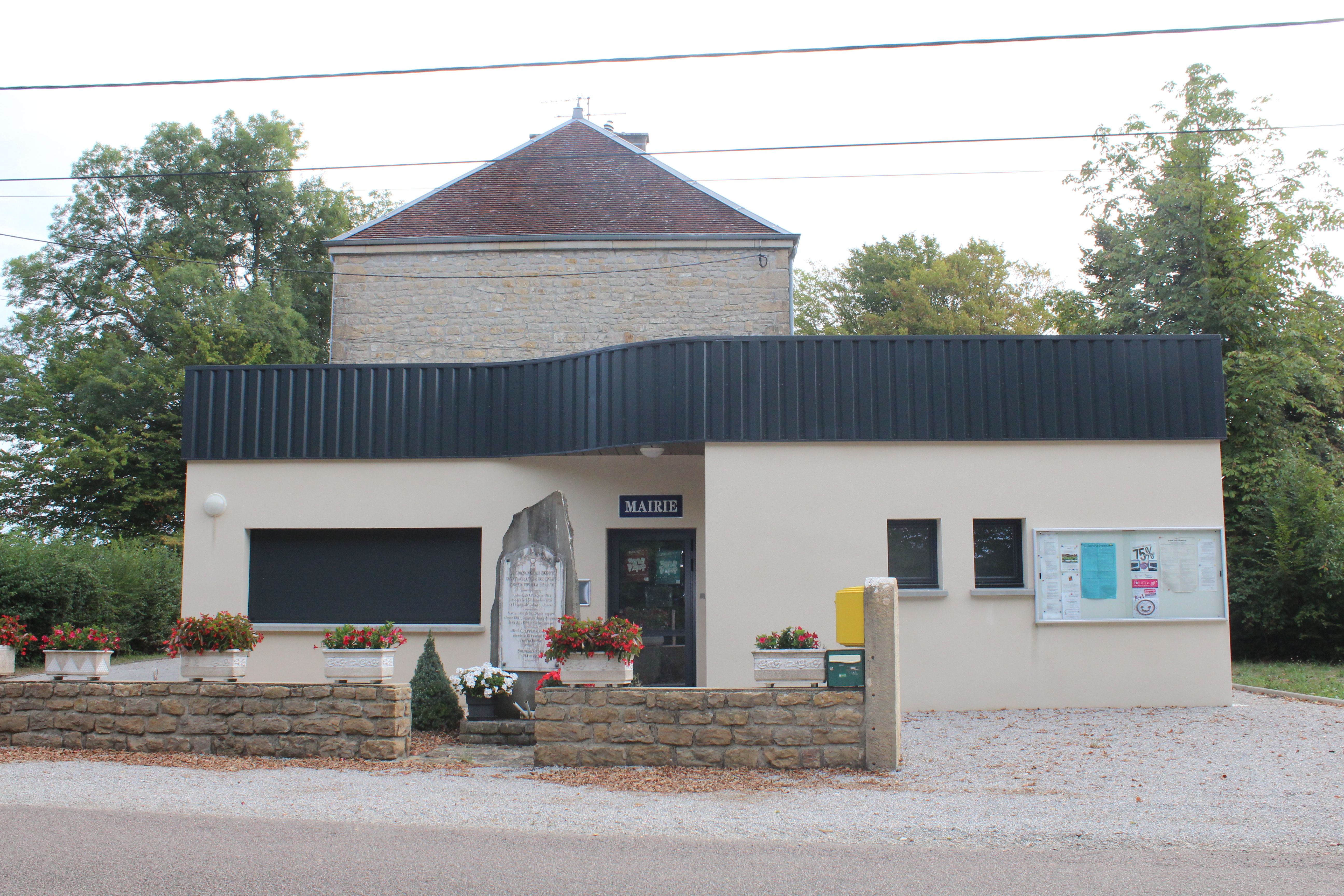 Mairie des Repôts.